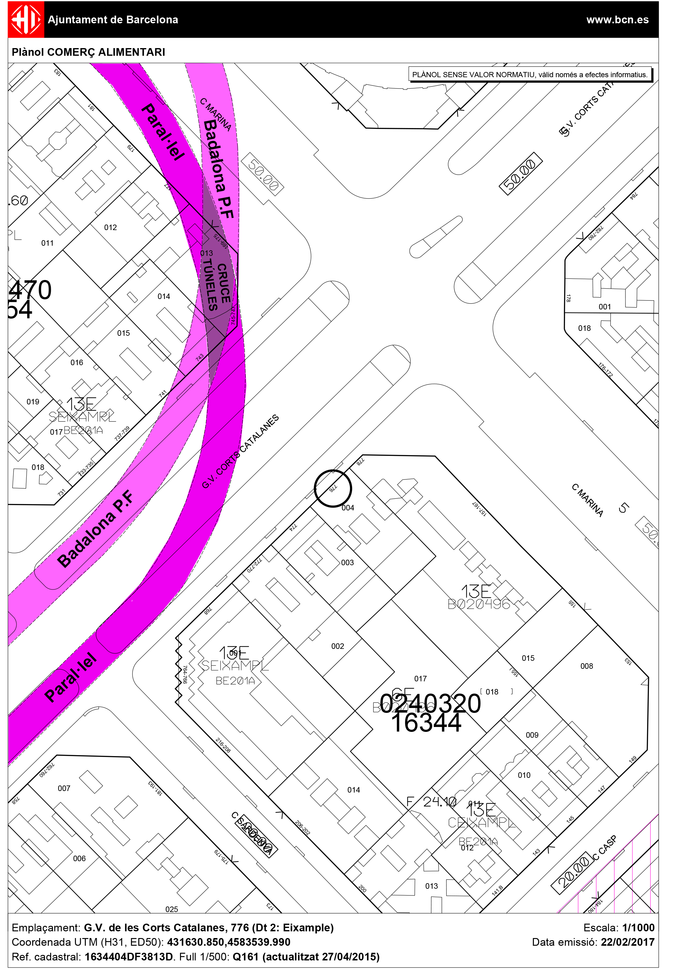 Plano cruzamiento túneles L2 en Monumental